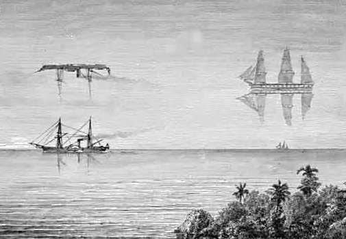 Mirages - Vision déformée de navires